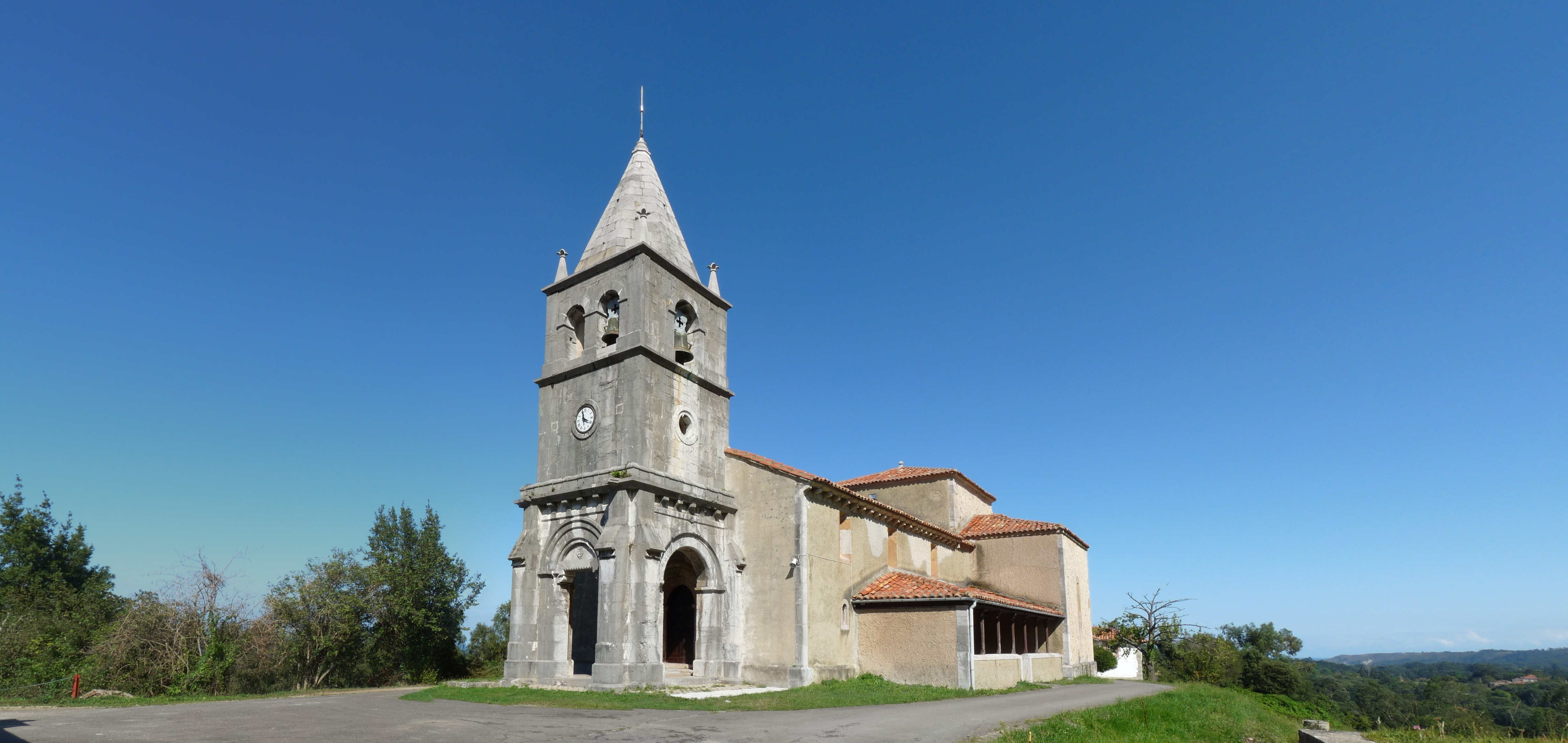 Pría - Iglesia de San Pedro